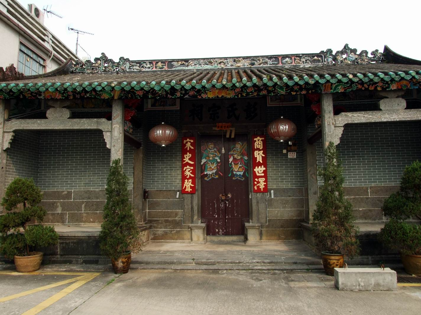 彭氏宗祠